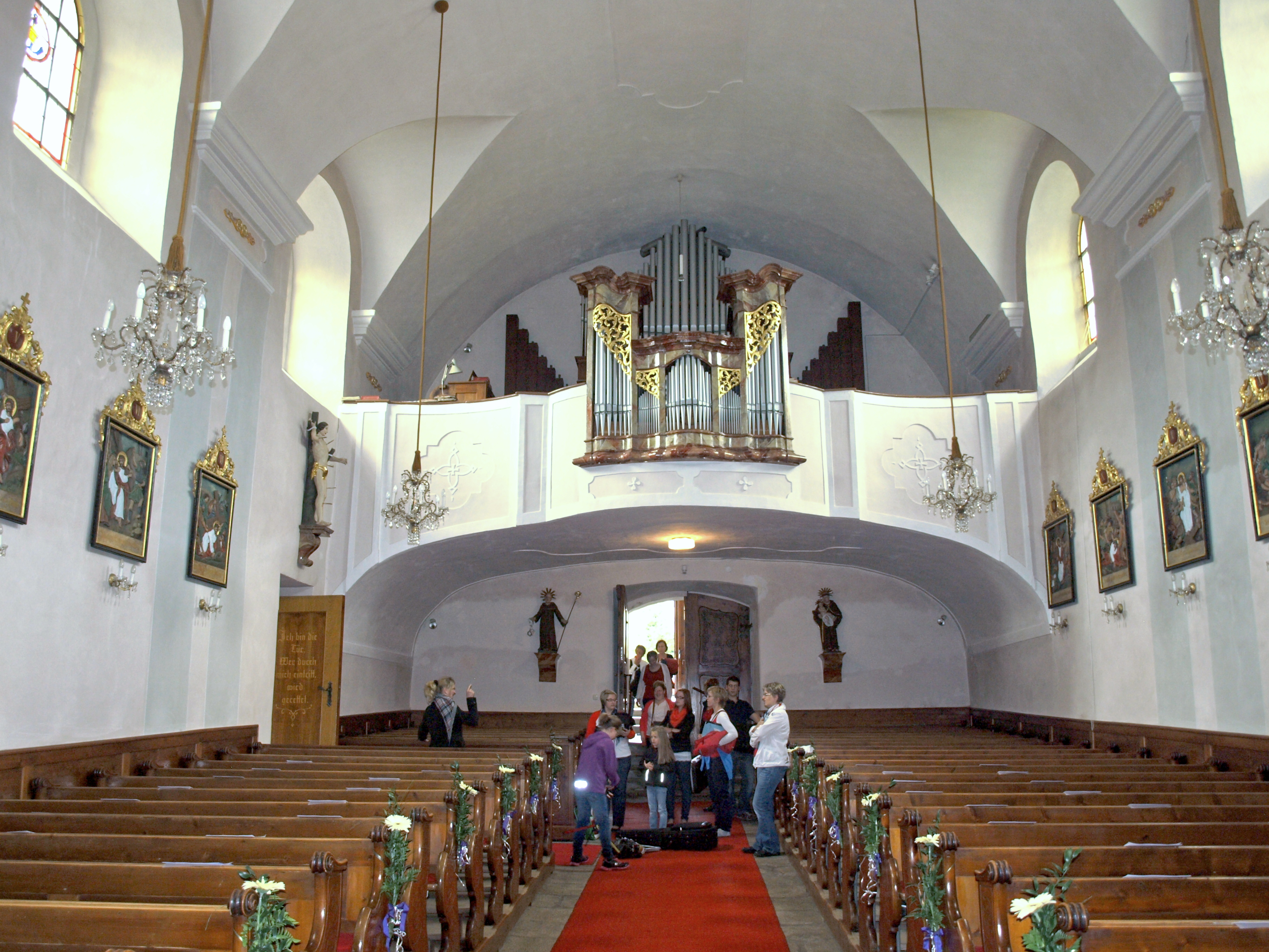 Kath. Pfarrkirche hll. Bartholomäus und Thomas